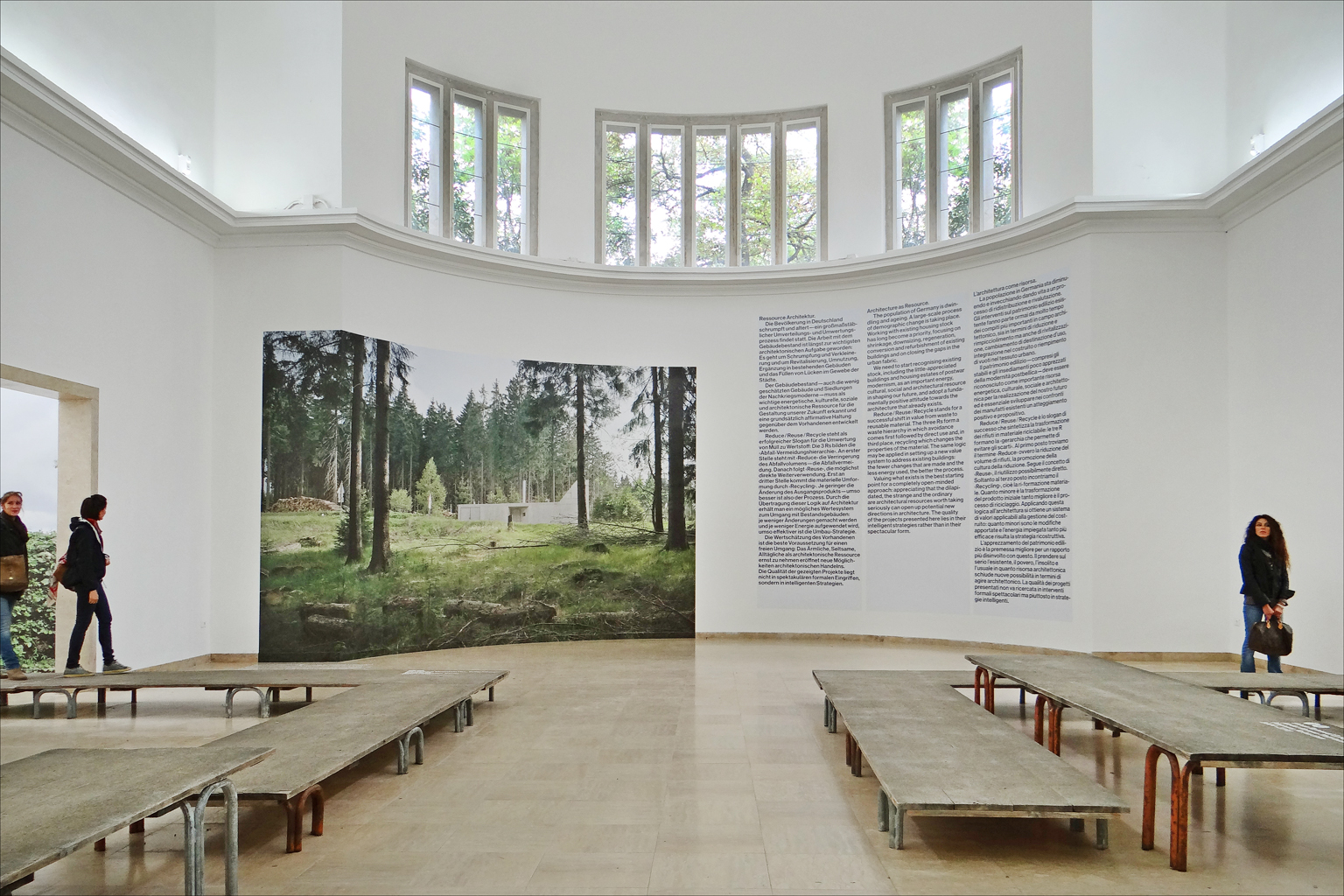 Intérieur du pavillon national de l'Allemagne avec les passerelles de l'acqua alta Exposition autour des 3 R : Reduce / Reuse / Recycle Valoriser ce qui existe en Allemagne doit être le premier objectif à atteindre en architecture. C'est une source d'inspiration et de motivation pour le développement urbain. La démarche privilégiée est de tirer parti des ressources architecturales et de prendre de nouvelles orientations à partir de l'existant dans un pays comme l'Allemagne dont la population est vieillissante. Réduire / Réutiliser / Recycler sont les nouveaux mots d'ordre. Le pavillon, que l'on parcourt symboliquement sur des passerelles utilisées à Venise au moment de l'acqua alta, présente de manière sommaire quelques projets représentatifs de cette approche des 3R. Parmi ceux-ci, figure la réutilisation à Saint Nazaire de la base sous-marine construite par l'armée du IIIe Reich.. (Voir une photo : AFF Architekten, Berlin / AMUNT Architekten Martenson und Nagel Theissen, Aachen, Stuttgart / Atelier Kempe Thill Architects and Planners, Rotterdam / Brandlhuber+ ERA, Emde, Schneider, Berlin / Diener & Diener Architekten, Basel, Berlin / Urs Füssler, Berlin/Jörg Leeser, Cologne / Heinle, Wischer und Partner, Stuttgart / Hild und K Architekten, Munich / knerer und lang Architekten, Dresden / LIN Architects Urbanists, Berlin / Meixner Schlüter Wendt Architekten, Frankfurt am Main / RobertneunTM, Berlin / Schulz & Schulz, Leipzig / Staab Architekten, Berlin Site officiel du pavillon de l'Allemagne reduce-reuse-recycle.de/ __________ Le premier pavillon de l'Allemagne a été conçu en 1909 pour accueillir les artistes de la Secession munichoise. Il a été démoli en 1938 sur ordre d'Hitler pour être remplacé par un bâtiment conçu par l'architecte allemand Ernst Haiger dans le style national-socialiste.